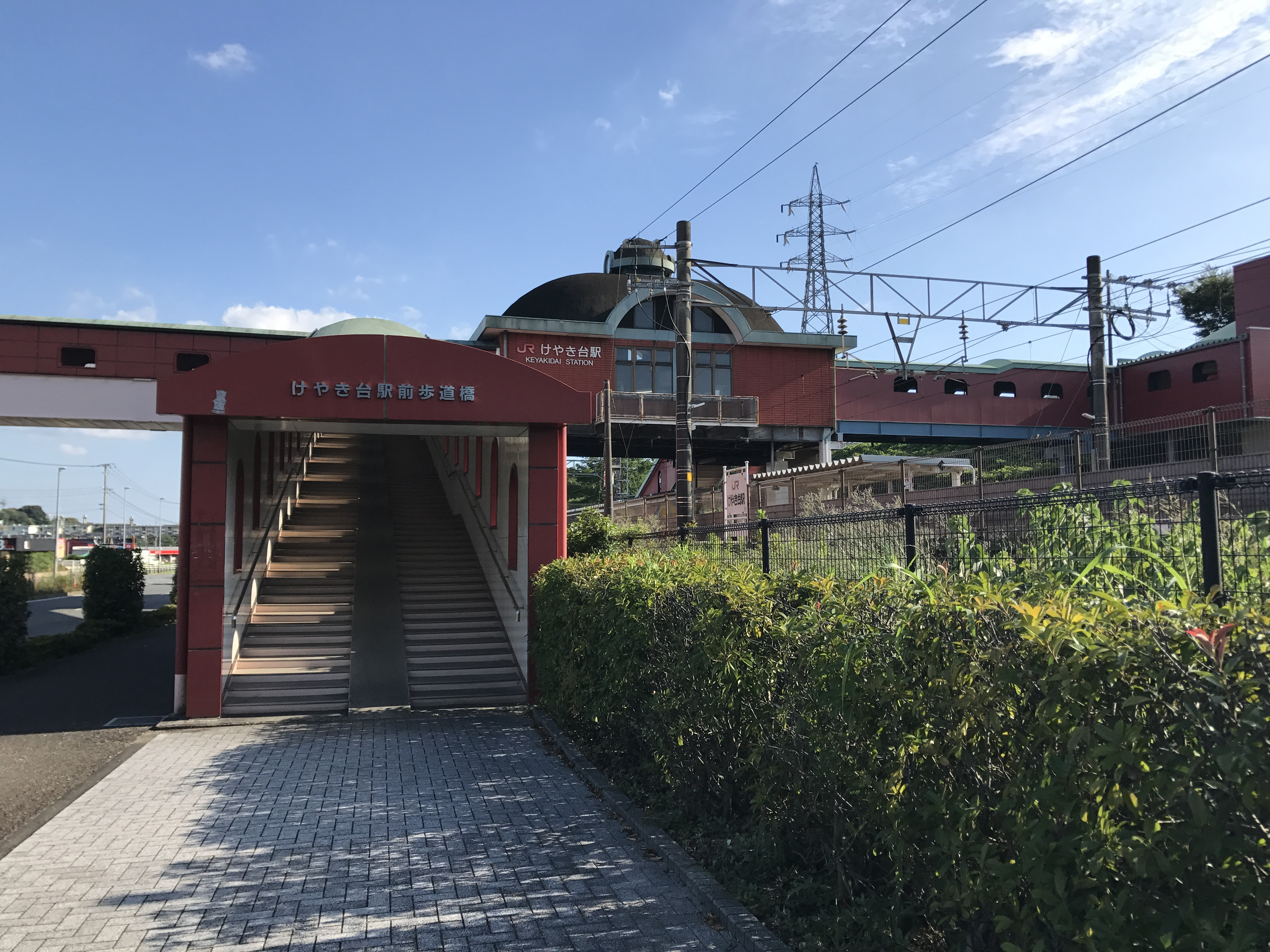 けやき台駅駅舎